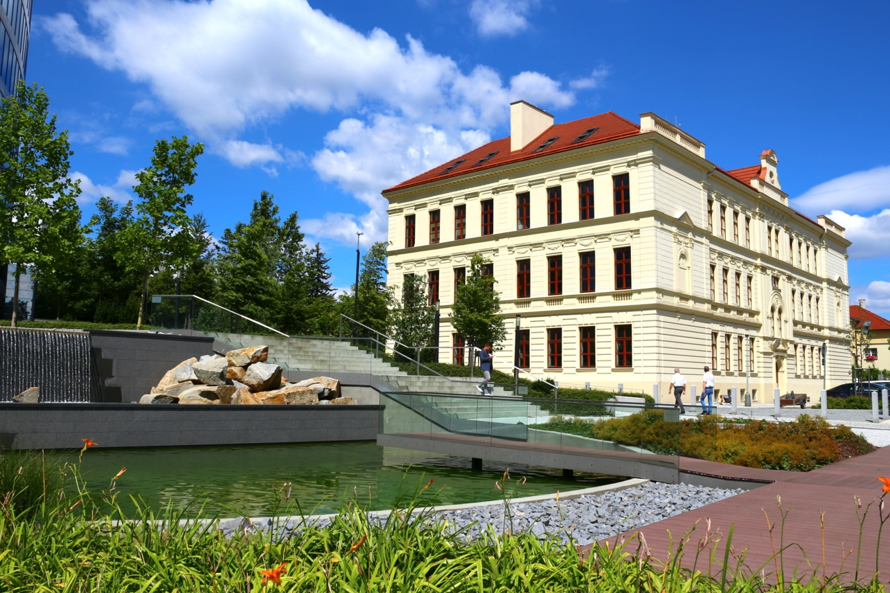 Budova křesťanské školy Elijáš